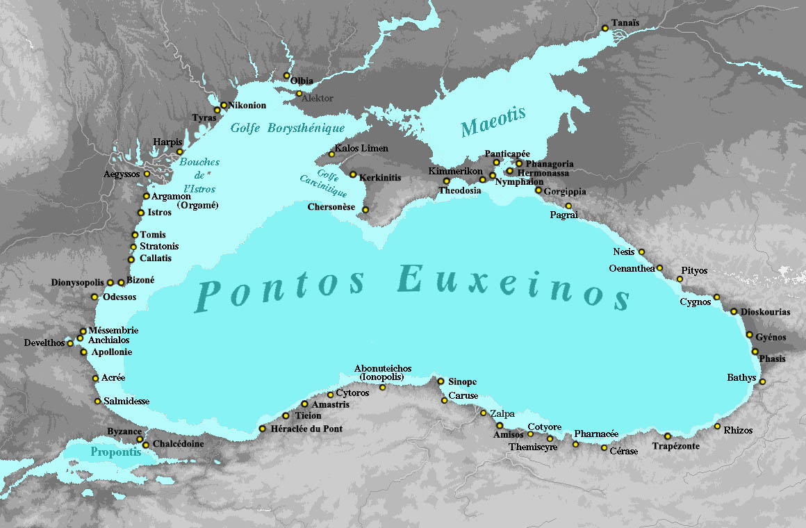 Colonisation grecque antique en Mer Noire